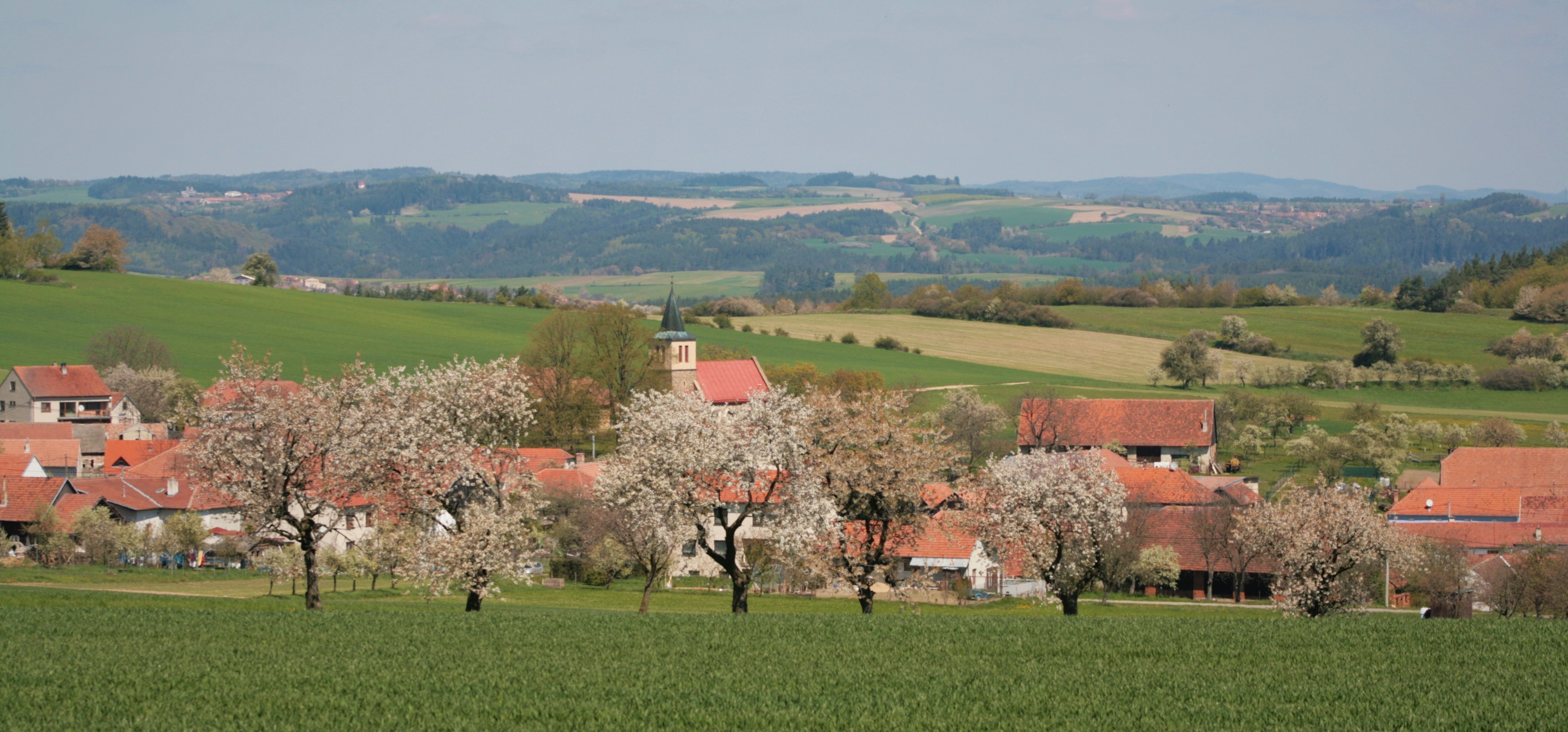 Kuřimská Nová Ves v okrese Brno-venkov. Celkový pohled od jihu z vyhlídky u silnice.